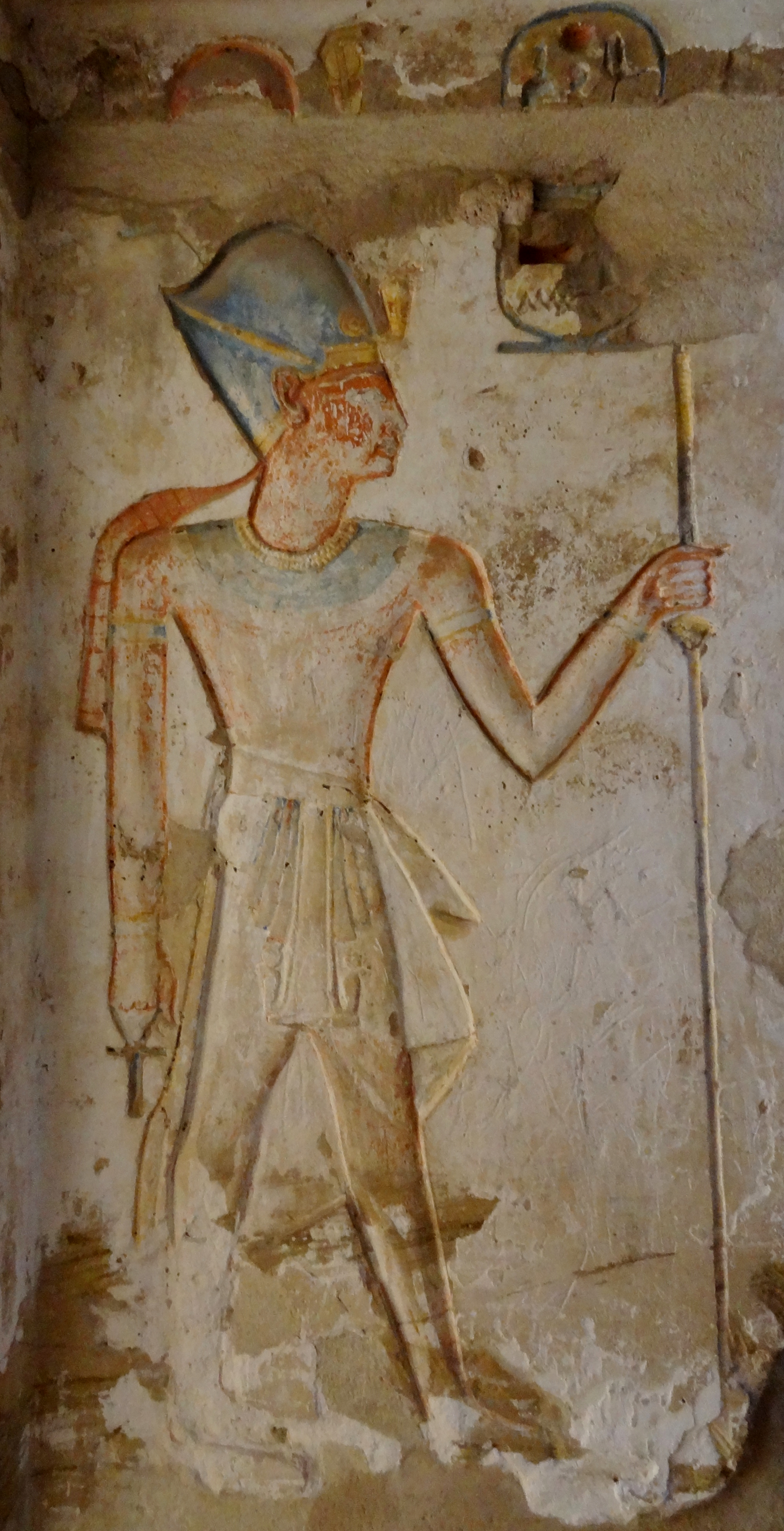 Der König tritt in den Raum ein, der die Unterwelt repräsentiert, Relief an der Südwestwand des Durchgangs von Raum 26 zu Raum 27 im Totentempel Ramses’ III. in Medinet Habu, Ägypten